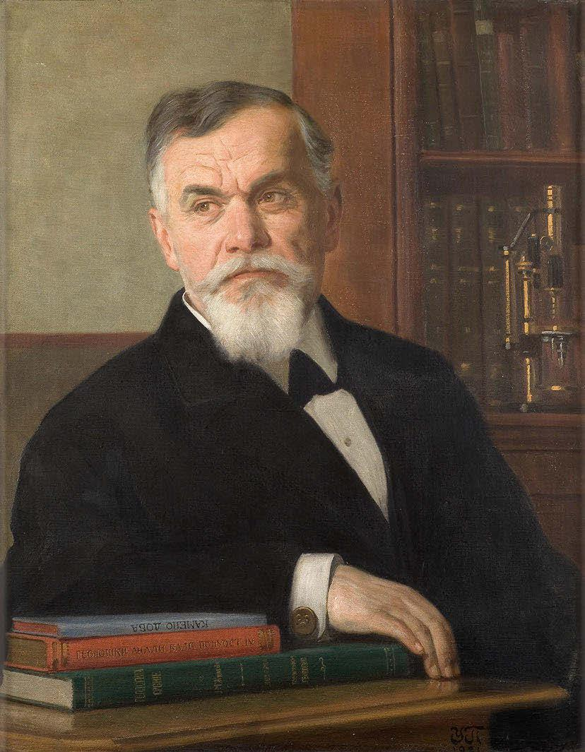 Портрет Јована Жујовића, рад Уроша Предића